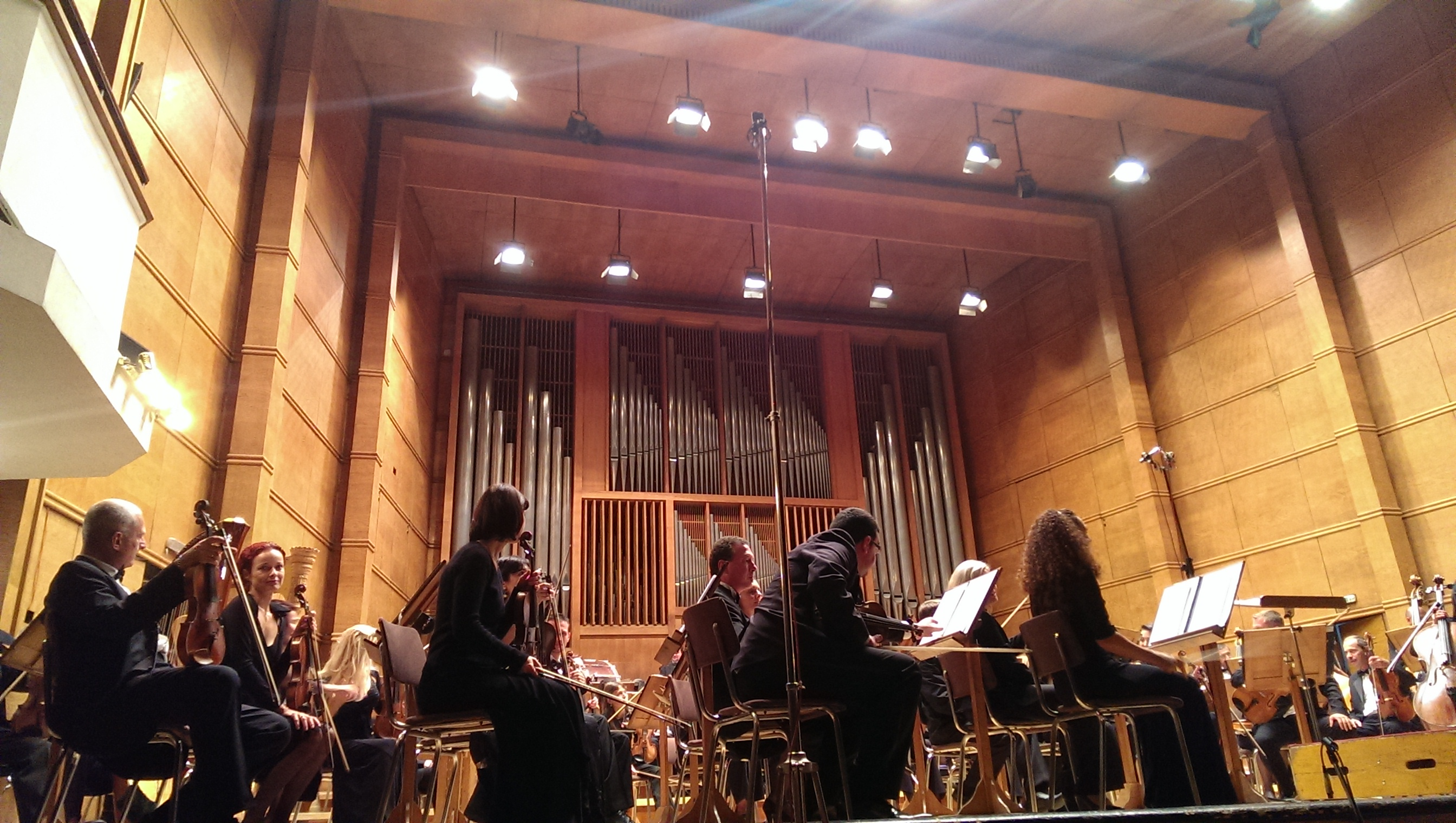 СО на БНР, щрайх